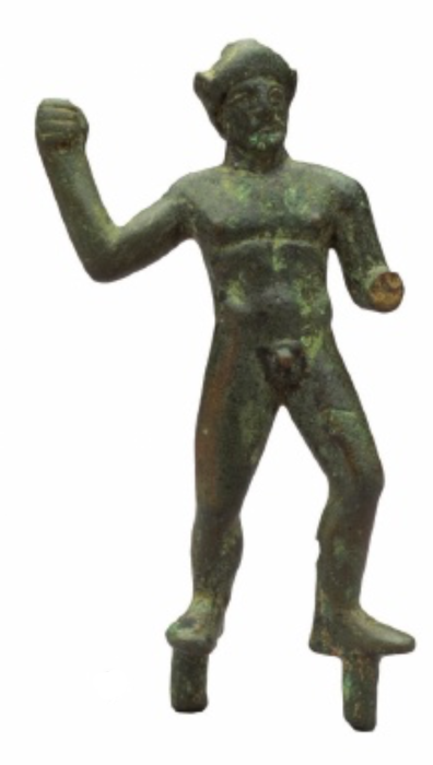 Figureta de Mars Balearicus de Biniatram (Ciutadella, Menorca). Hispanic Society de Nova York.